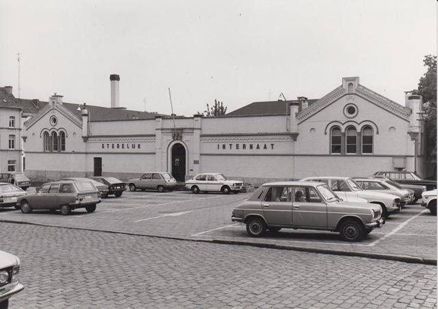 Gent Kramersplein 23